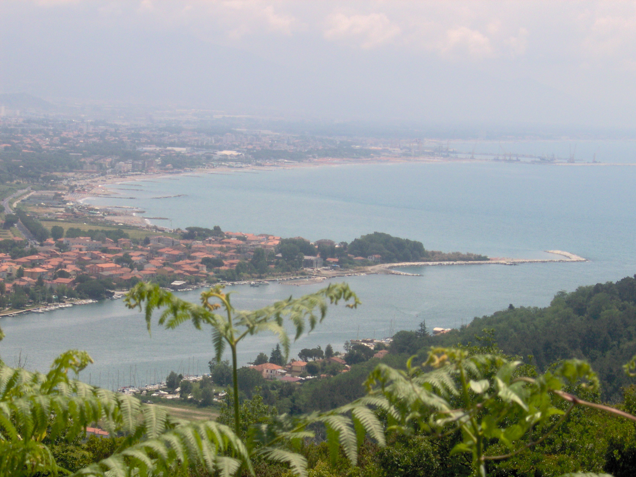 La foce del fiume Magra